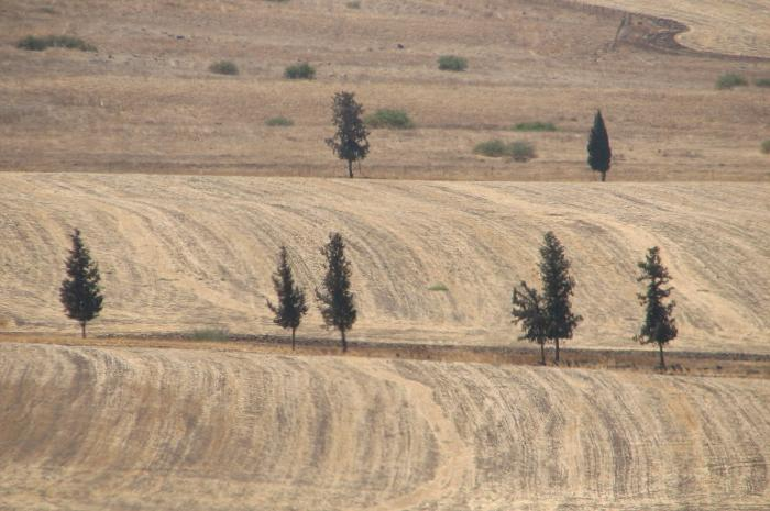 ברושים בשדה ליד בית השיטה